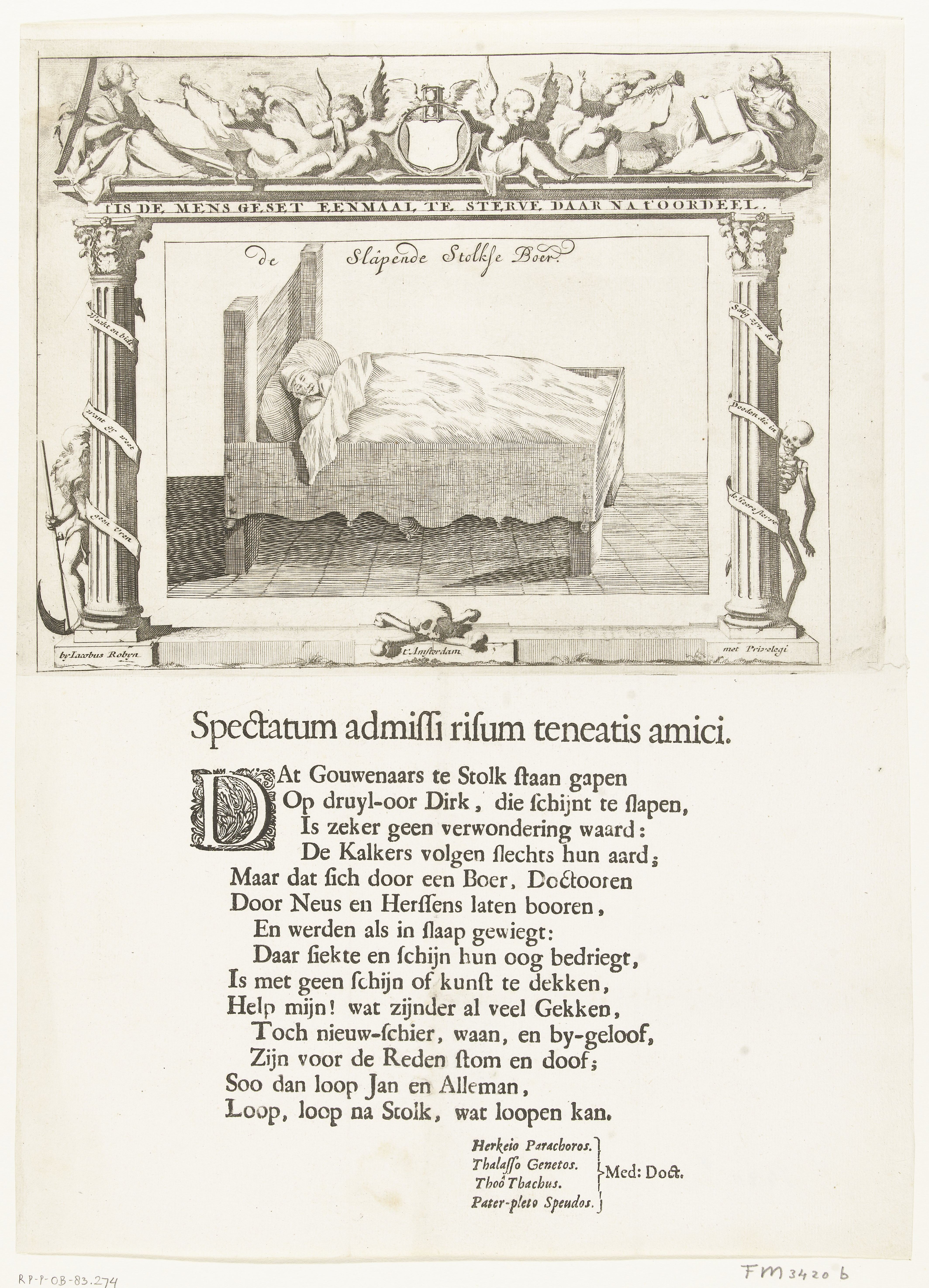 IdentificatieTitel(s): De slapende boer van Stolwijk, 1707de Slapende Stolkse Boer (titel op object)Objecttype: prent spotprent Objectnummer: RP-P-OB-83.274Catalogusreferentie: FMH 3420-bAtlas van Stolk 3340Omschrijving: De slapende boer van Stolwijk, of de zgn. slapende Stolkse boer. Dirk Klaasz de Bakker sliep van 29 juni 1706 tot 11 januari 1707 (27 weken) en is na het wekken weer ingeslapen tot 15 maart 1707. De boer slapend in zijn bed, in een omlijsting met zuilen Waar: achter Vader Tijd en de Dood zich schuil houden. Bovenaan een fries met putti en personificaties van de Hoop en Geloof. Vastgeplakt onder de plaat een vers van 14 regels.VervaardigingVervaardiger: prentmaker: anoniemuitgever: Jacobus Robijn (vermeld op object)verlener van privilege: onbekend (vermeld op object)Plaats vervaardiging: prentmaker: Noordelijke Nederlandenuitgever: AmsterdamDatering: 1707Fysieke kenmerken: ets, gravure en boekdrukMateriaal: papier Techniek: etsen / graveren (drukprocedé) / boekdrukAfmetingen: blad: h 380 mm × b 275 mmToelichtingDe allegorische omlijsting is wellicht een deel van een oudere plaat.OnderwerpWat: sleeping in bedWanneer: 1707 - 1707WaarStolwijkWie: Dirk Klaasz de BakkerVerwerving en rechtenVerwerving: aankoop 1881Copyright: Publiek domein